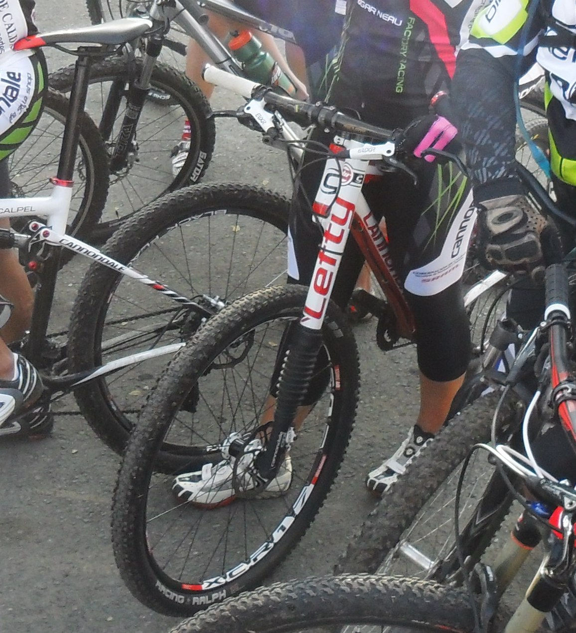 Lefty sistema de suspensiónpara bicicletas de montaña